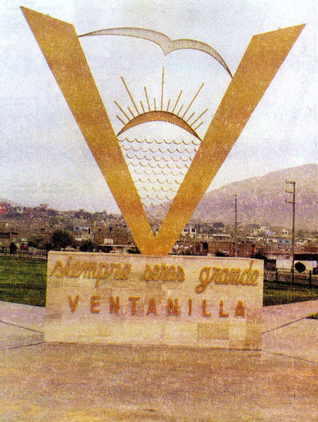 Parque - Jardin la "V"